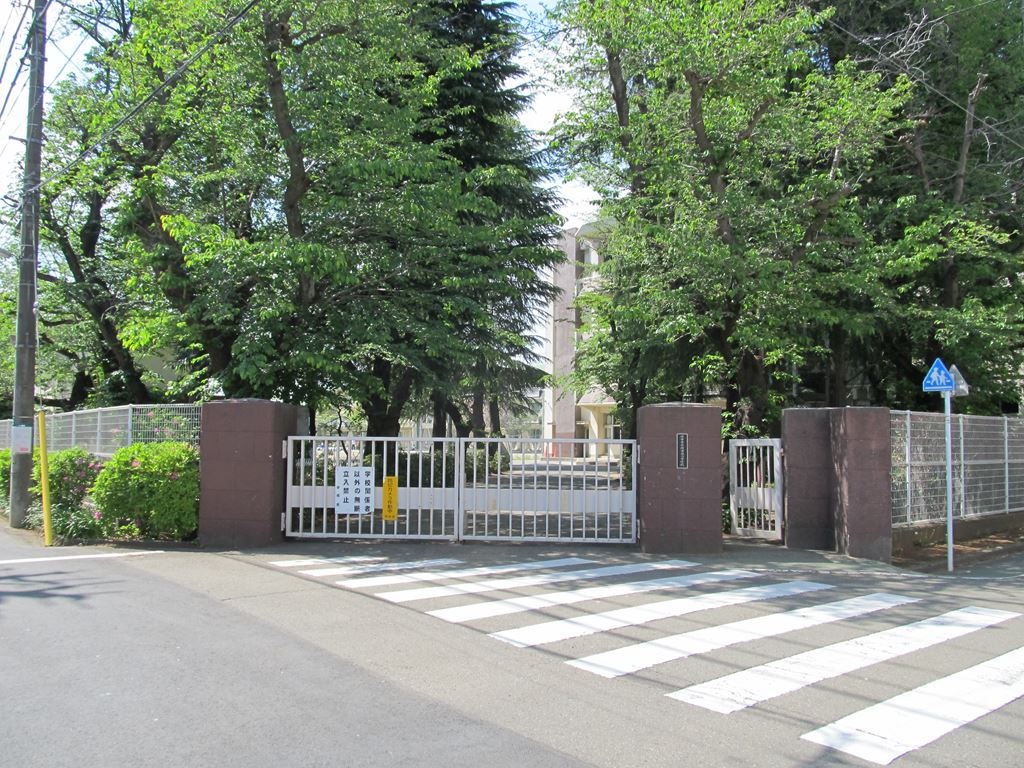 東京都府中市立府中第四中学校